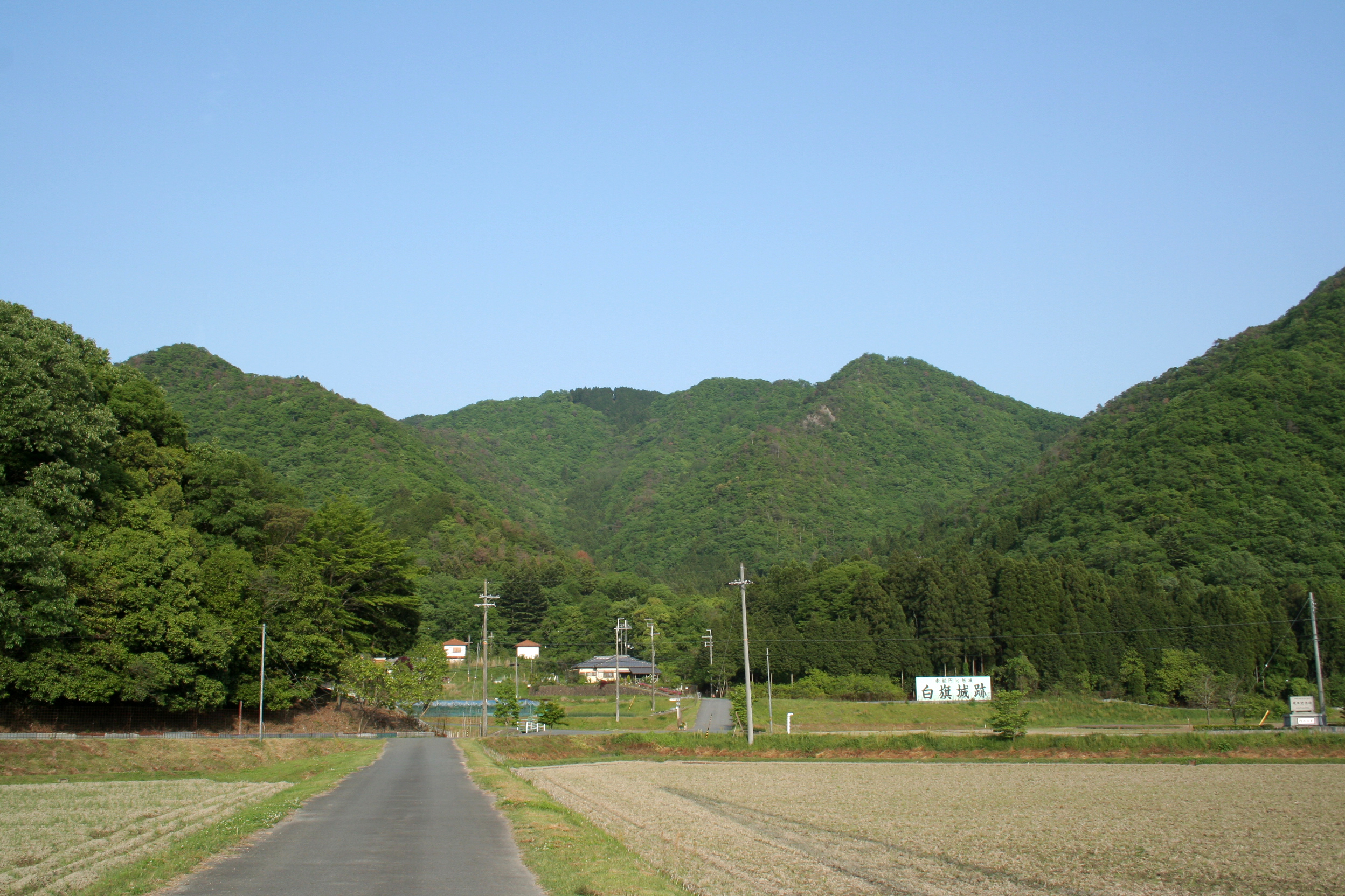 白旗城のあった山の写真。 西側から撮影。